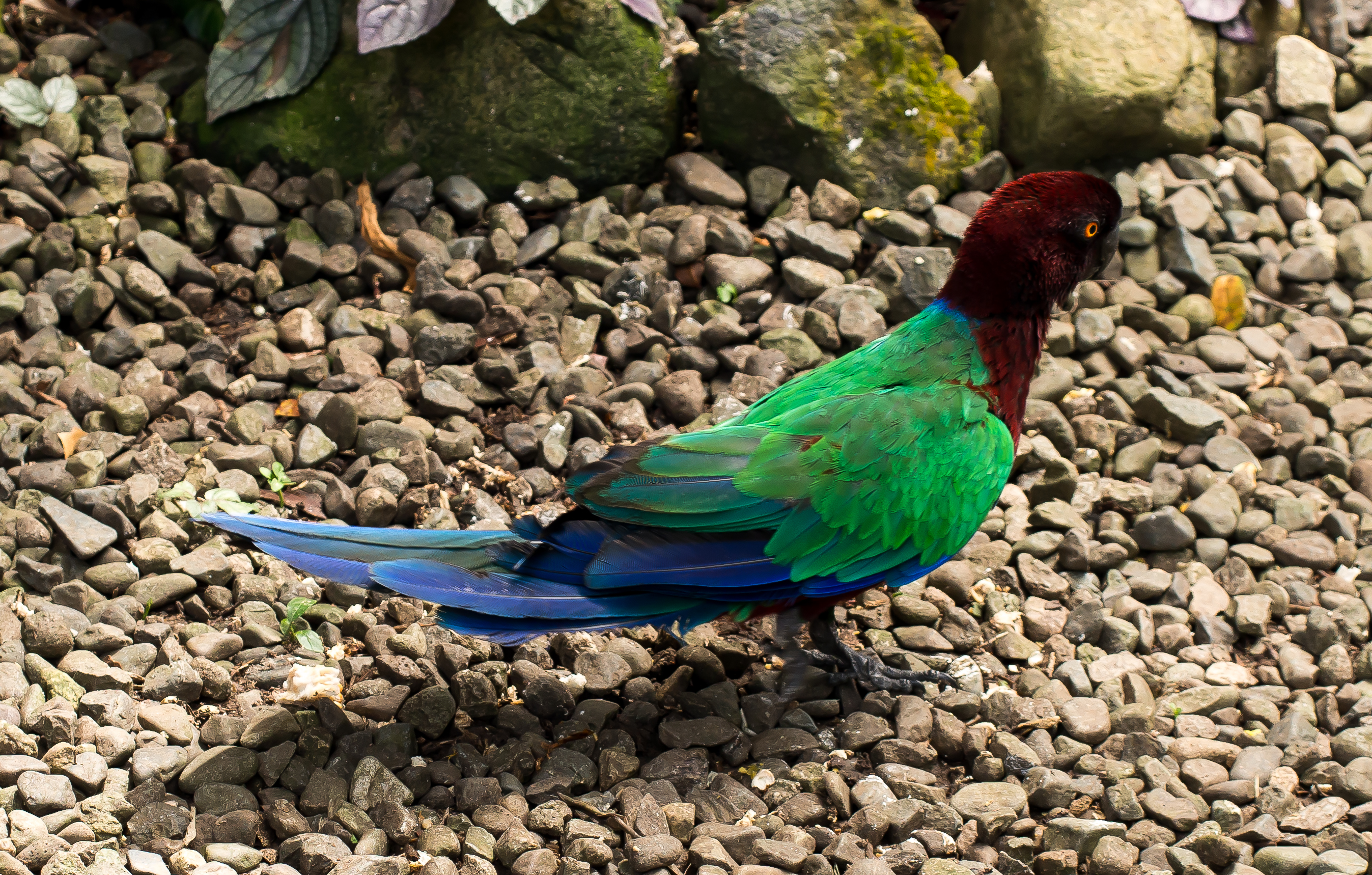 Pompadoursittich - Prosopeia prosopeia